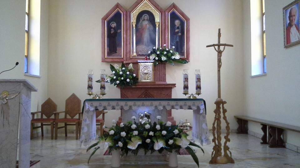 Prezbiterium